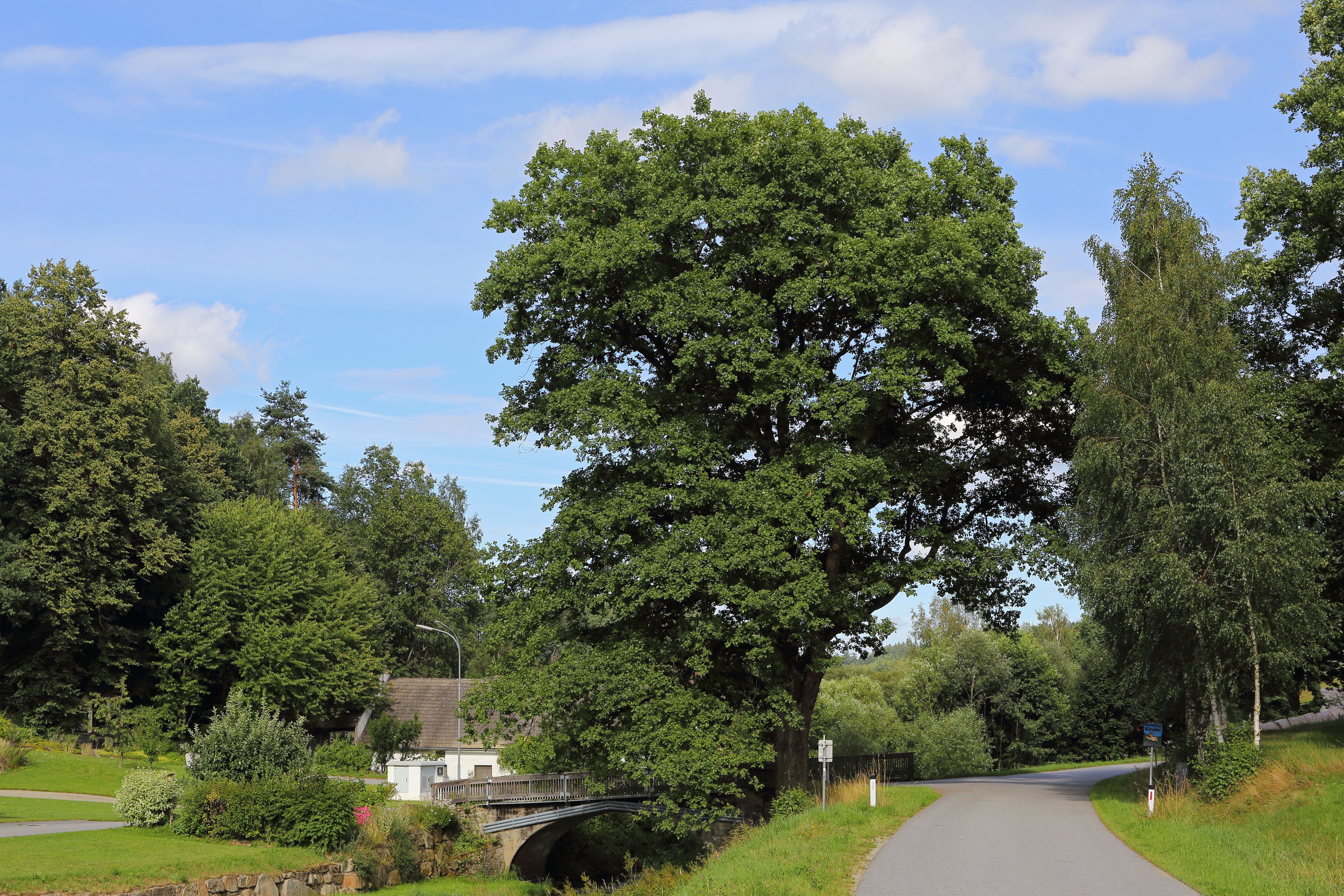 Die seit 1978 denkmalgeschützte Stieleiche in Langfeld (St Martin) hat einen Umfang von ca 3,3 Meter, eine Höhe von ca 23 Meter und ist etwa 165 Jahre alt. This media shows the natural monument in Lower Austria with the ID GD-069.